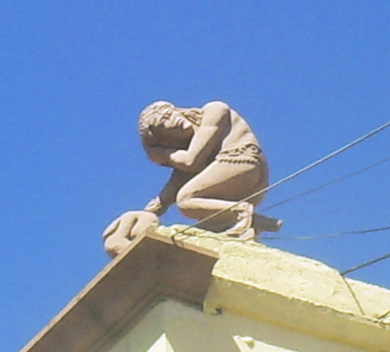 Fotografía de la estatua edificada en honor a Xólotl, caudillo de los Zacatecos, conocido como "El indio triste".